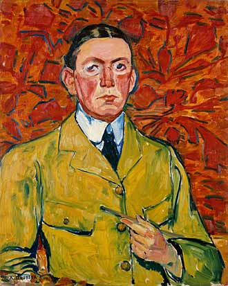 August Deusser: Selbstbildnis im grünen Rock, um 1911, Öl auf Leinwand, 65 × 52,5 cm